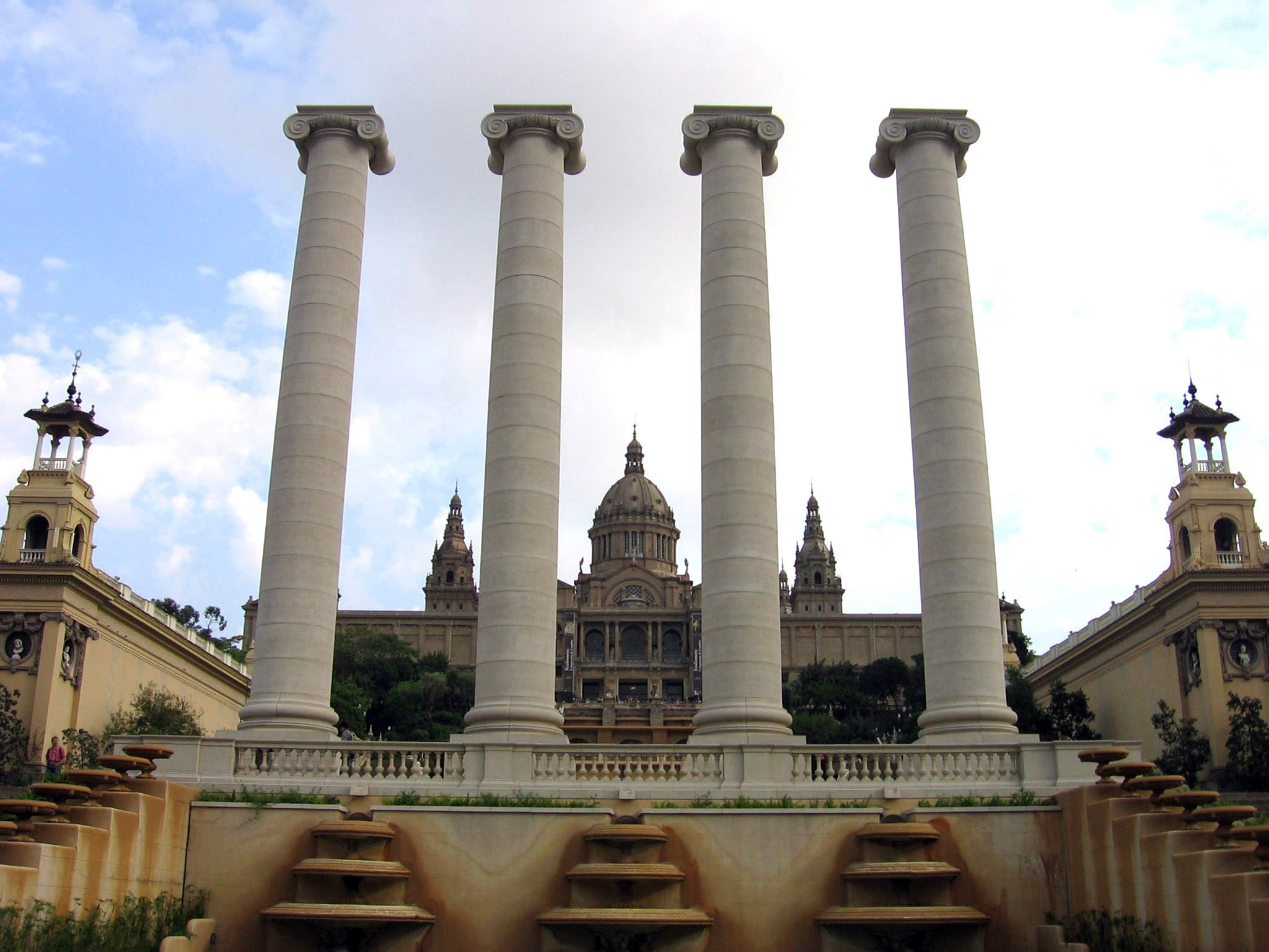 Las Cuatro Columnas de Puig i Cadafalch, Montjuïc (Barcelona).